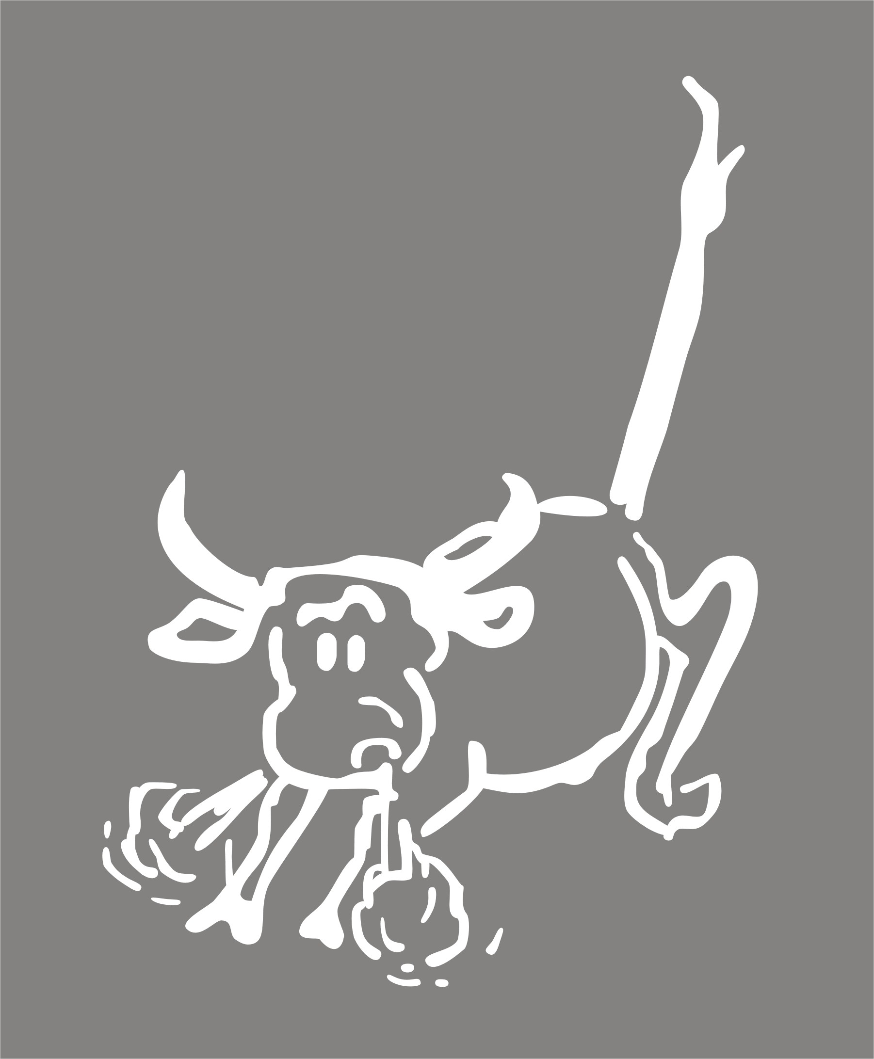 Uboot-Maling U47_"Stier"